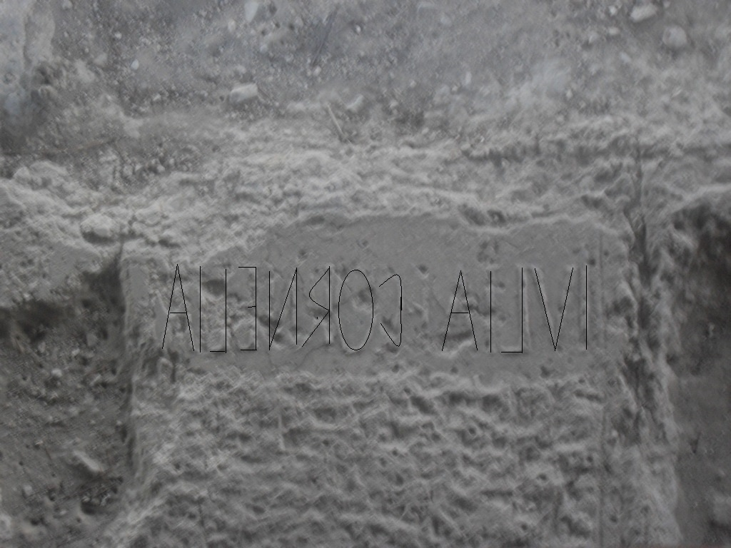 Terme romane di Vasto (Abruzzo), nell' ultimo ambiente, situato in basso, vicino al corridoio: epigrafe di Iulia Cornelia (come impronta in negativo lasciata sul sottofondo cementizio, nella pavimentazione costruita con marmi di spoglio di diversi spessori e dimensioni provenienti da edifici funerari e pubblici, di età precedente).